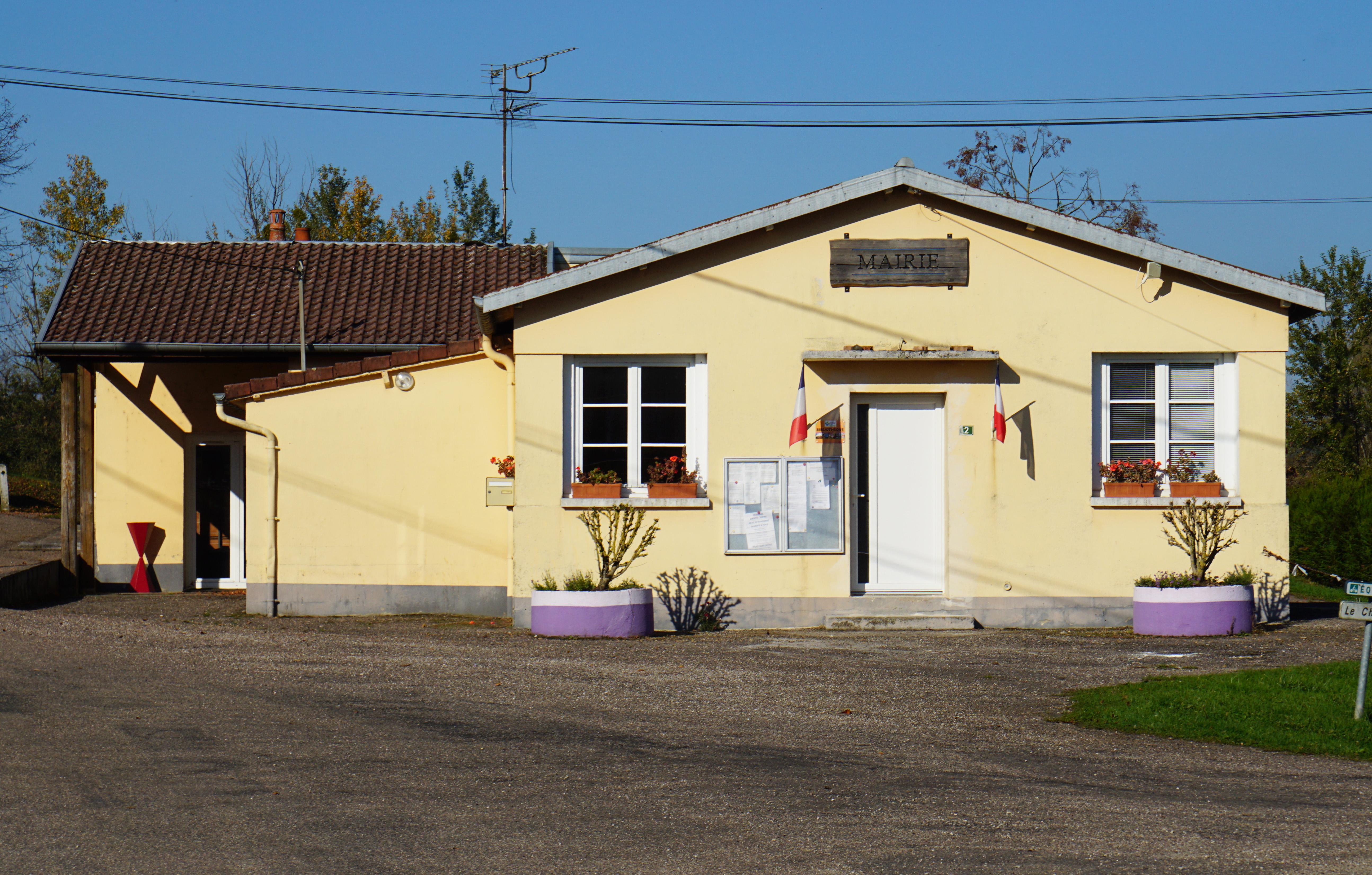 La mairie de Le Val-Saint-Éloi.